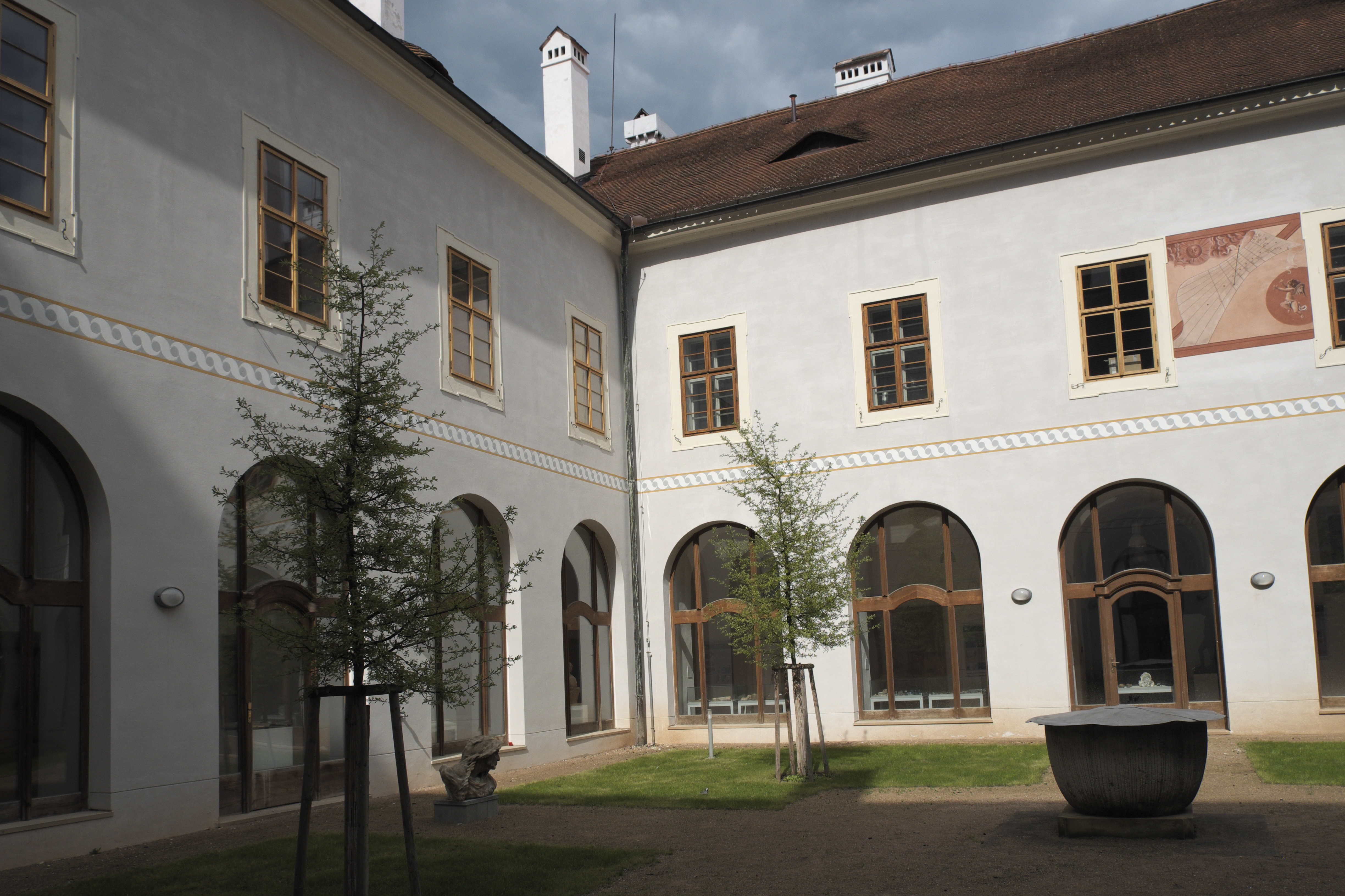 Innenhof des ehemaligen Piaristenkollegs, heute Sitz der Fakultät für Restaurierung der Universität Pardubice in Litomyšl im Okres Svitavy in der Pardubitzer Region in Tschechien